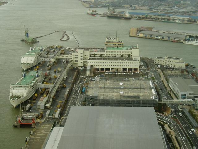 新潟港佐渡汽船ターミナル。朱鷺メッセ展望室より撮影。